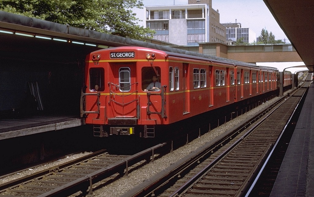 Rosedale Station circa 1971